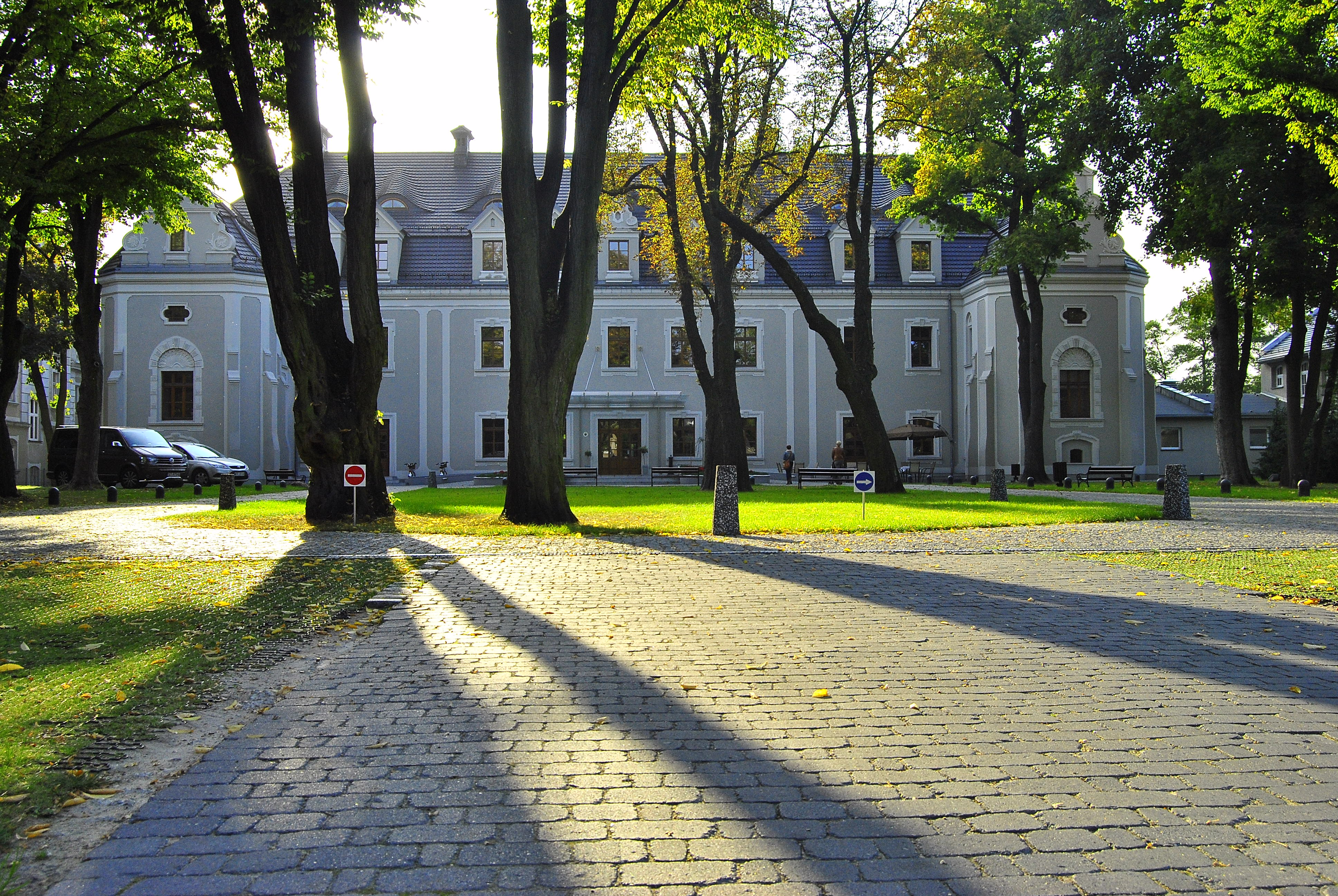 Hotel Zamek Lubliniec 03.1978.